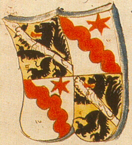 Fürstbischöfliches Wappen des Bamberger Fürstbischofs Anton von Rotenhan